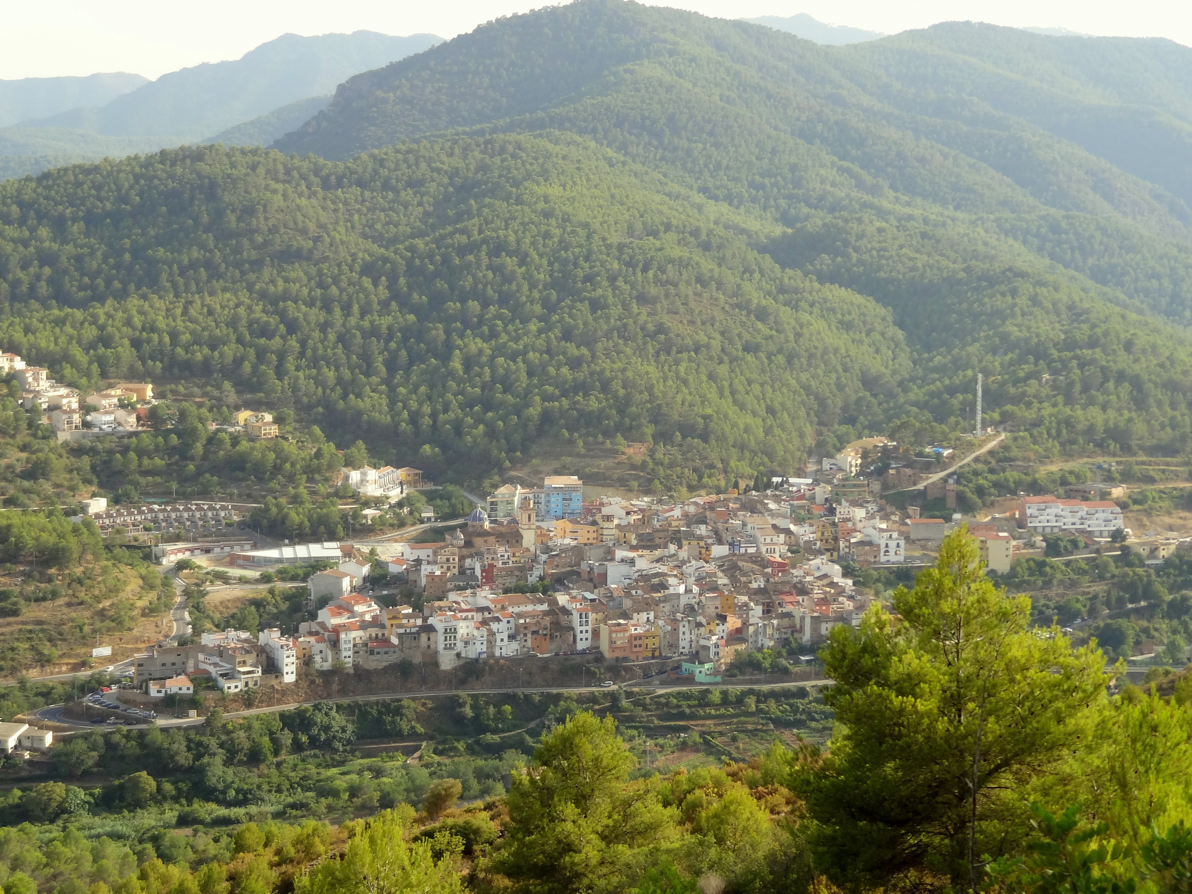 Vista general de Suera, Plana Baixa, País Valencià.